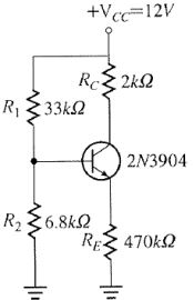 조선말: 전압 분배 바이어스